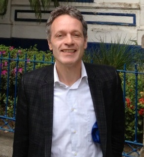 Pieter Steinz